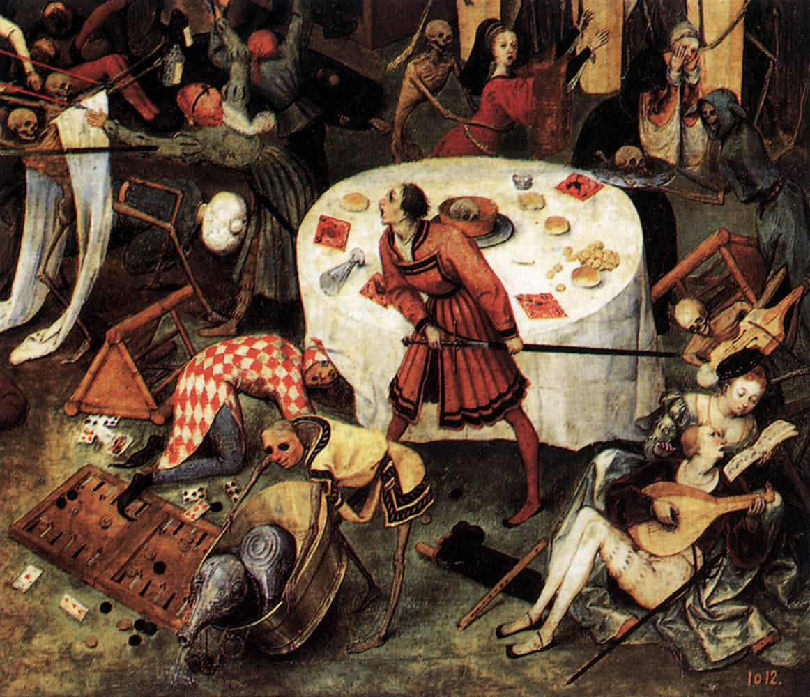 detail